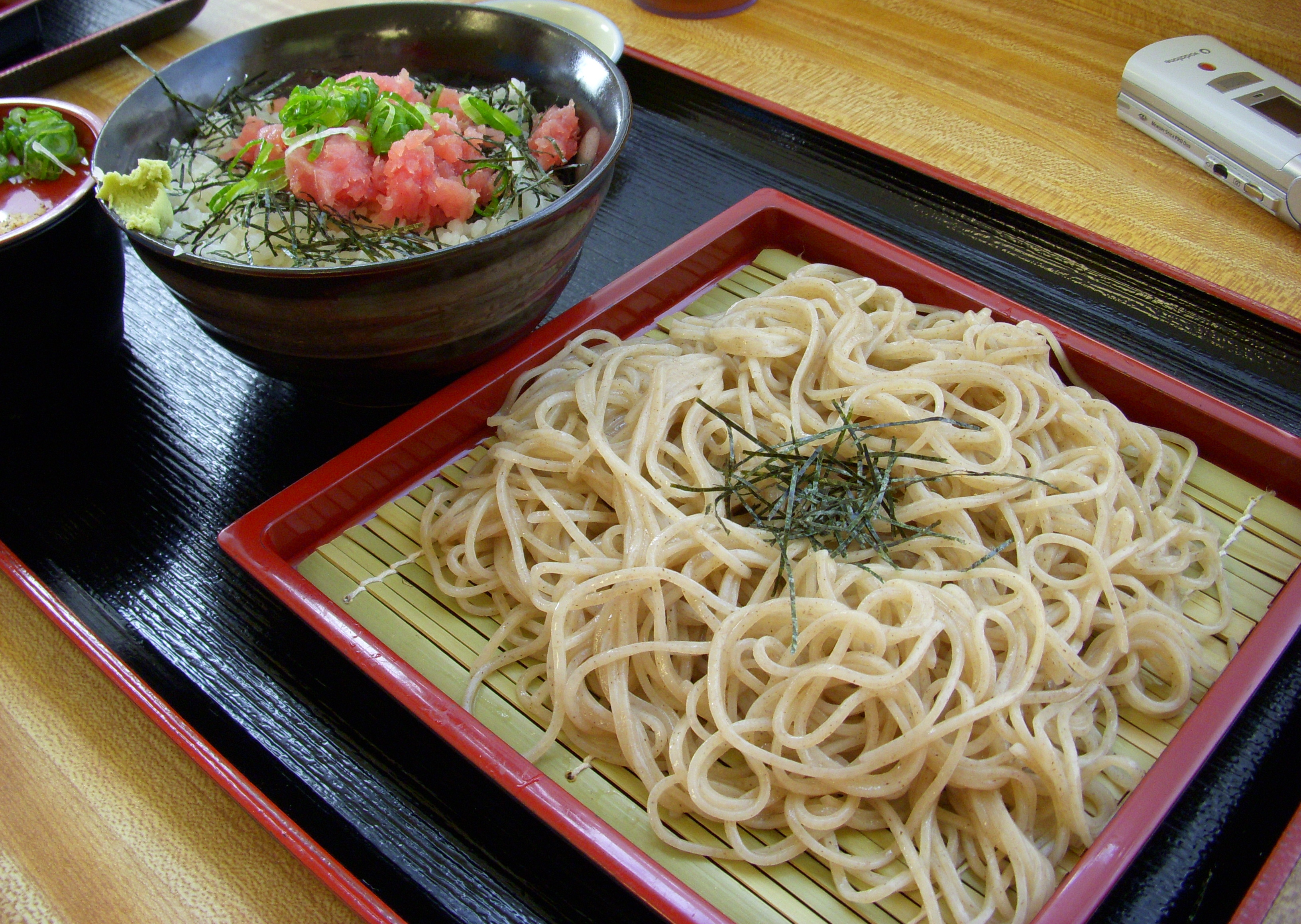 そば（米国カリフォルニア州トーランスの「そば処 いちみ庵本店」[1]）